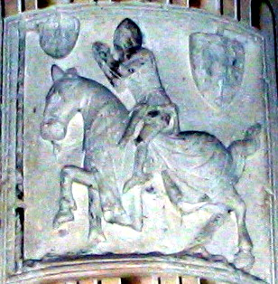 Cattedrale di Asti, targa raffigurante Arricino Moneta, capostipite leggendario degli Alfieri